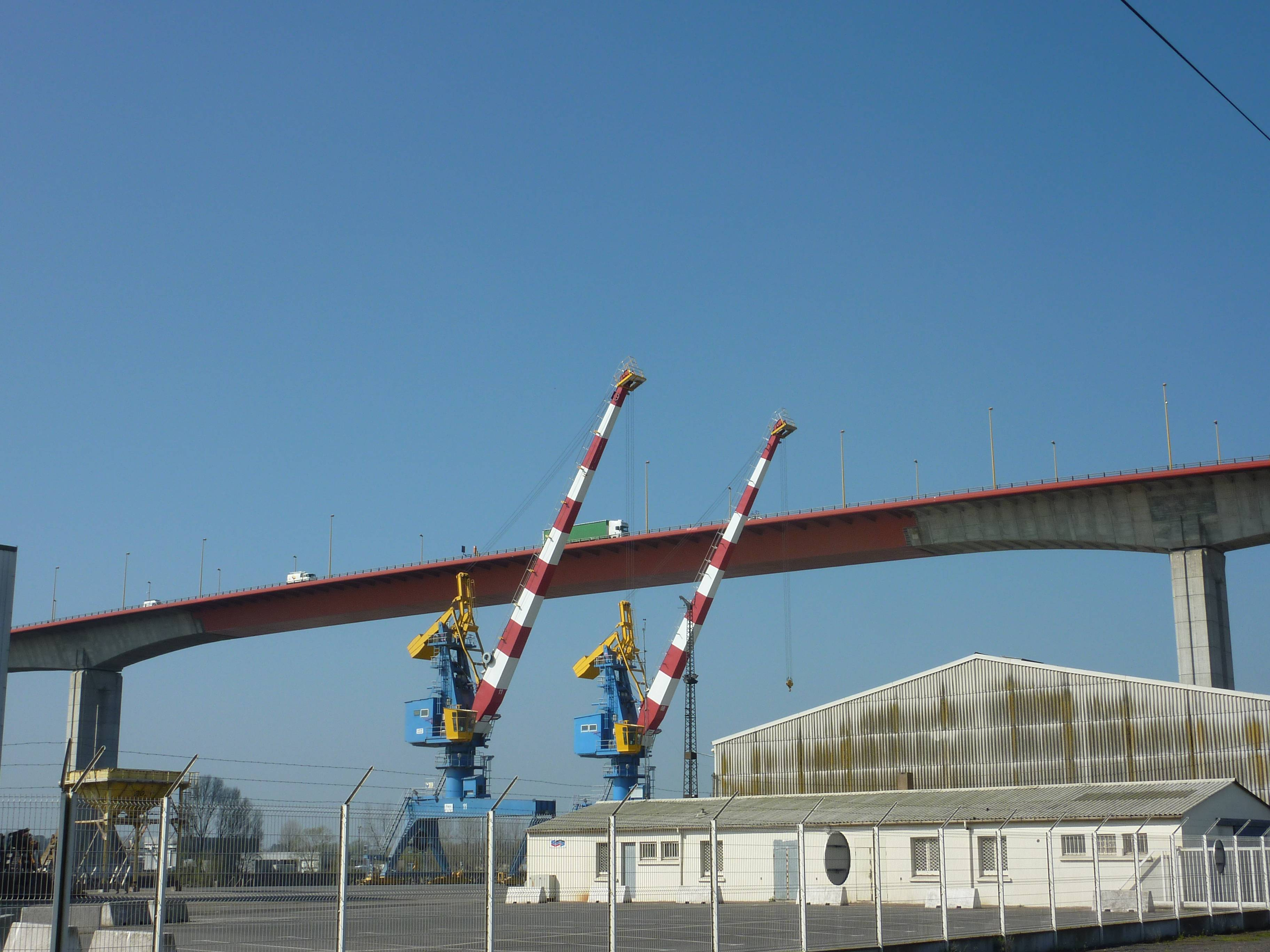 Pont de Cheviré à Nantes (France), poutre caisson à dalle orthotrope